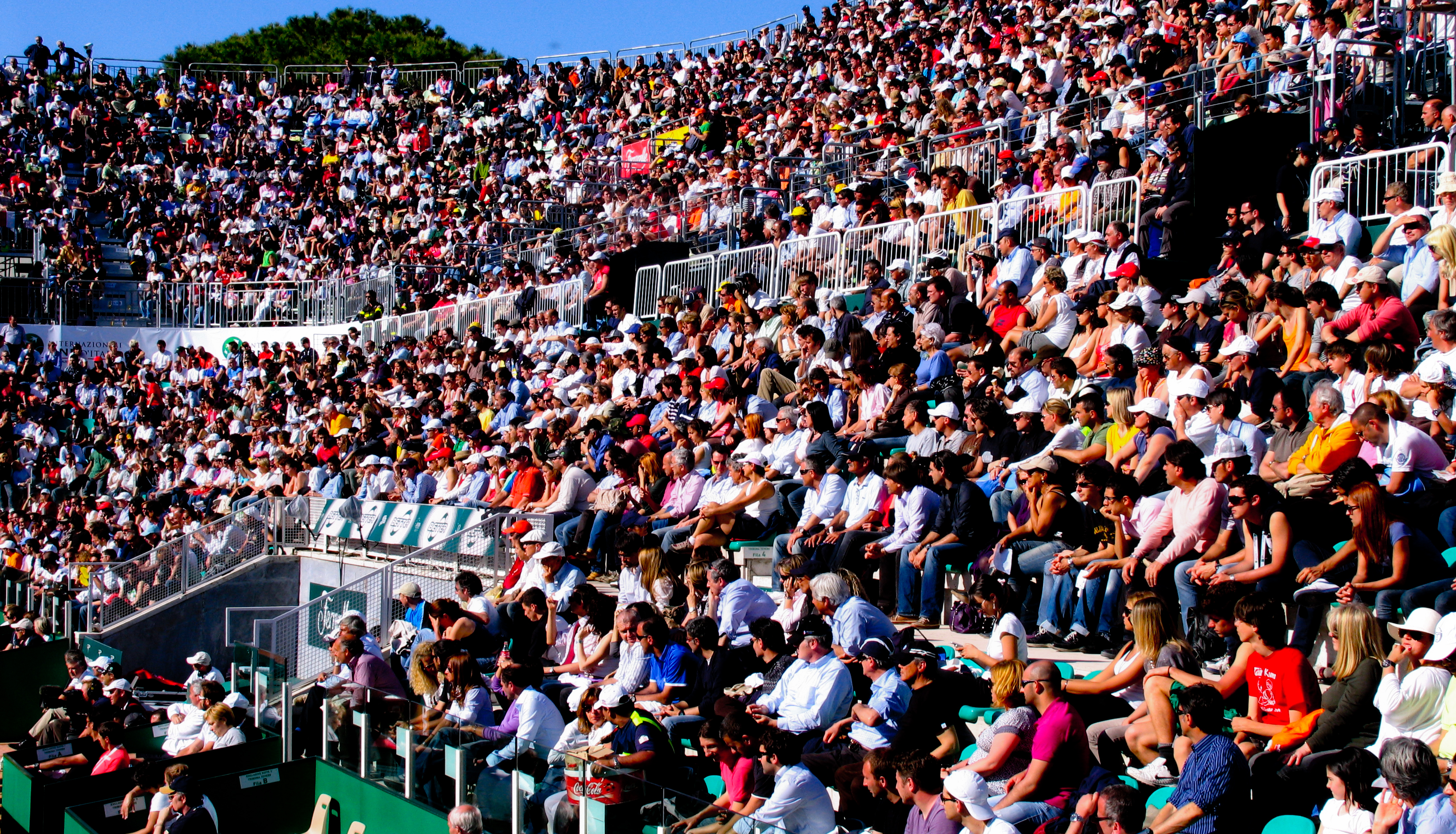 Fotografia di Gabriele Altimari